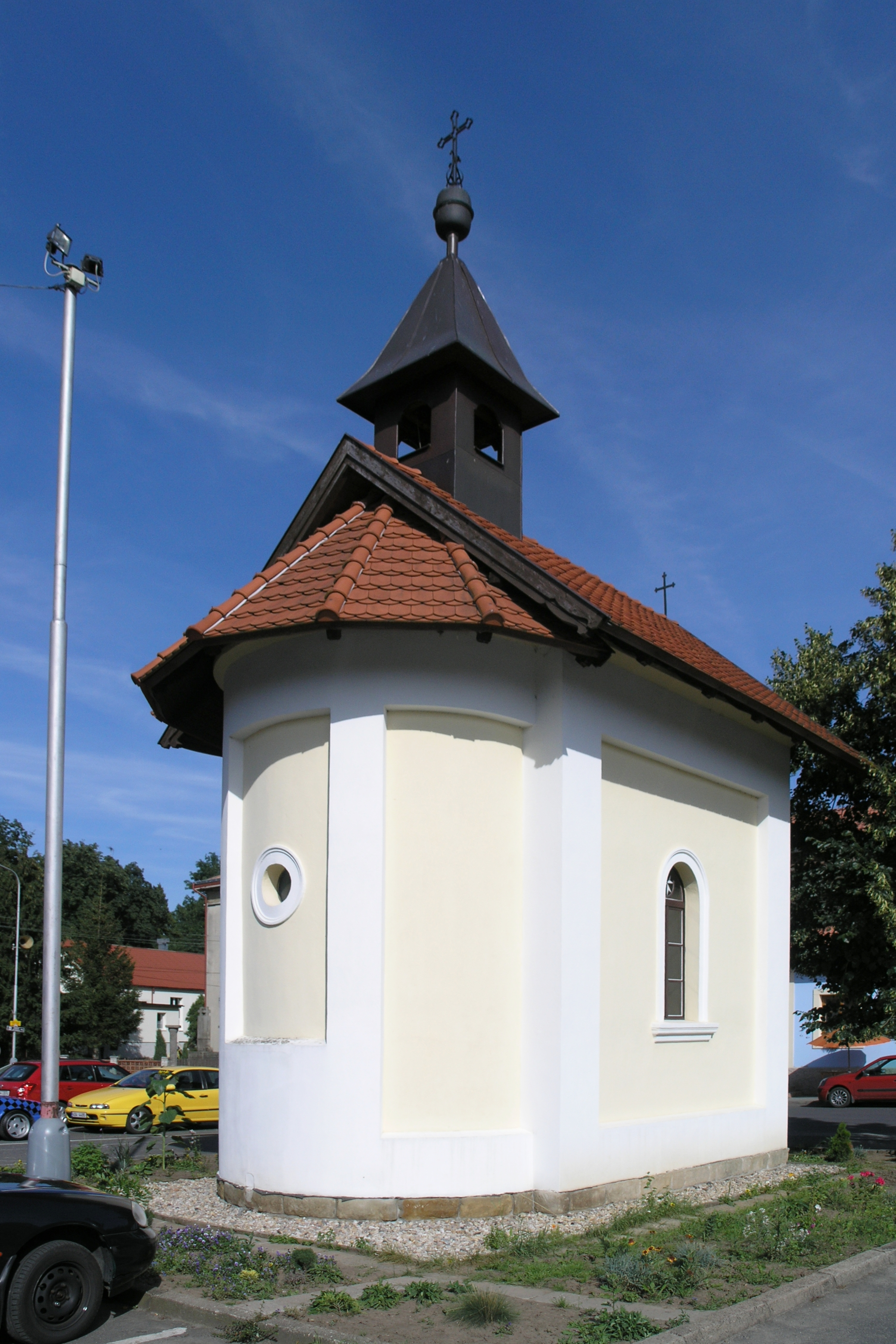 Dětenice